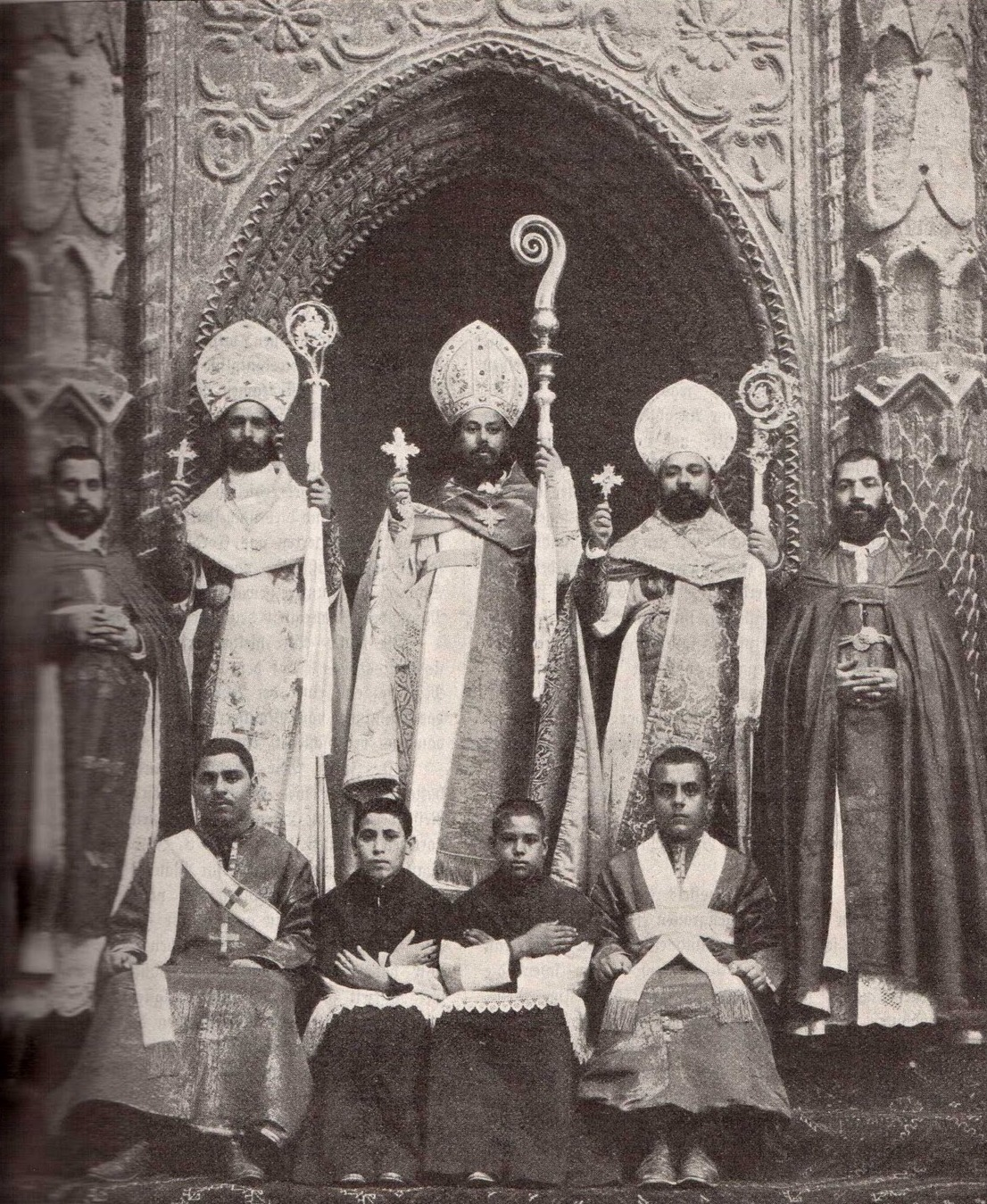 Hierarchia koptyjsko-katoliccy ok 1900 roku: W górnym rzędzie: po bokach dwaj prezbiterzy, w środku troje biskupów, od lewej Joseph-Maxime Sedfaoui - biskup Hermopolis, Cyryl Makarios - patriarcha Aleksandrii i Ignazio Gladès Berzi - biskup Teb; w dolnym rzędzie diakon, akolici i subdiakon